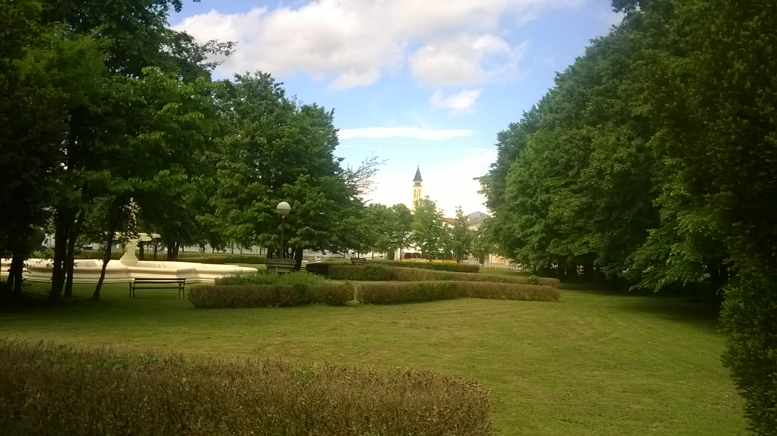 Kurpark, Lipik